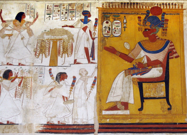 Image montrant le pharaon Ramsès II en audience devant un groupe de notables. XIXe dynastie. British Museum.